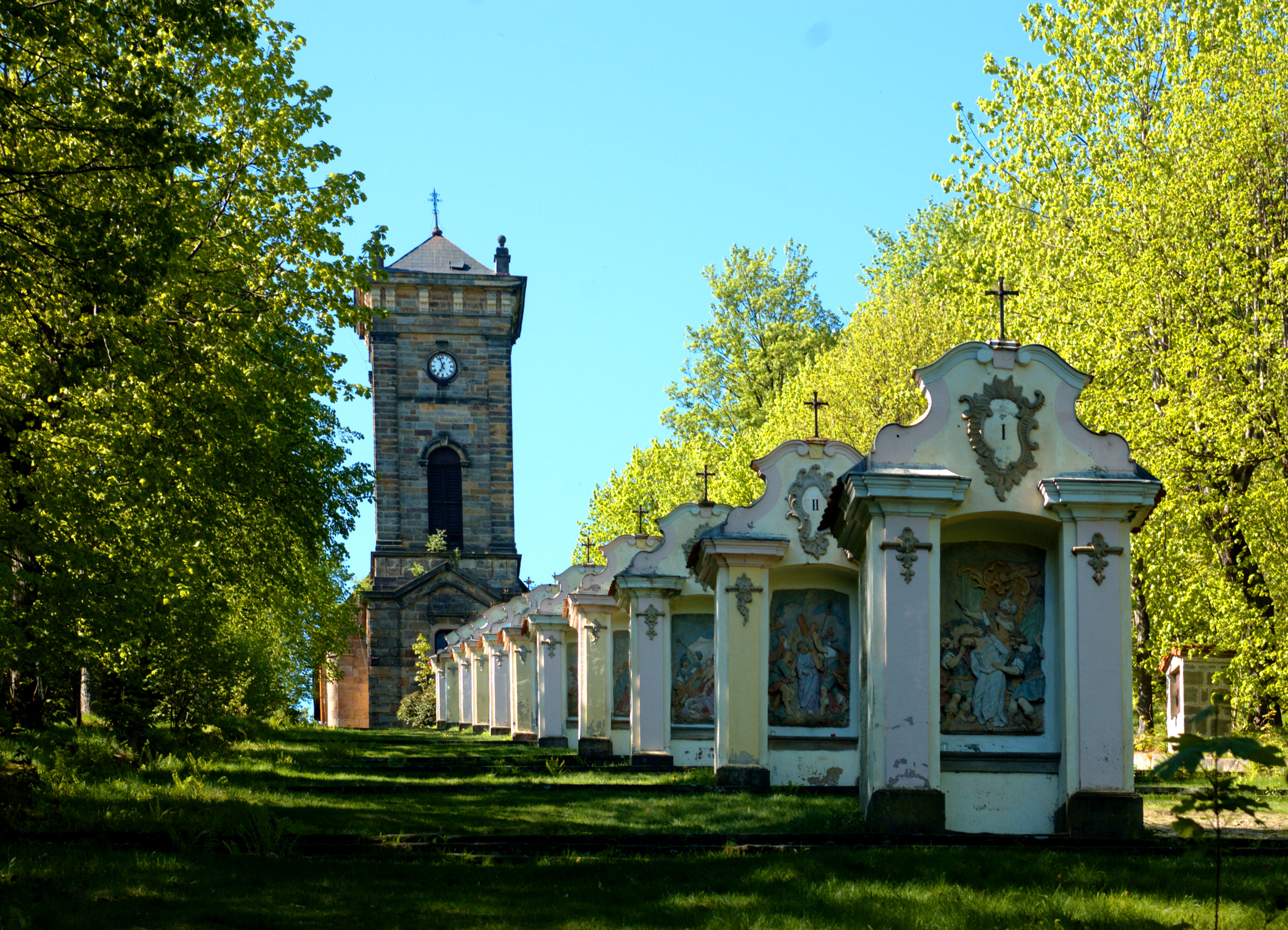 Kruisgang bij Jiřetín pod Jedlovou